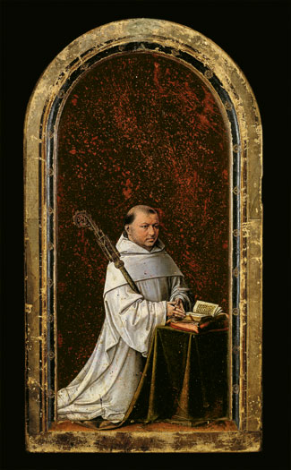 Diptych with Abbot Christiaan de Hondt, Koninklijk Museum voor Schone Kunsten, Antwerp.